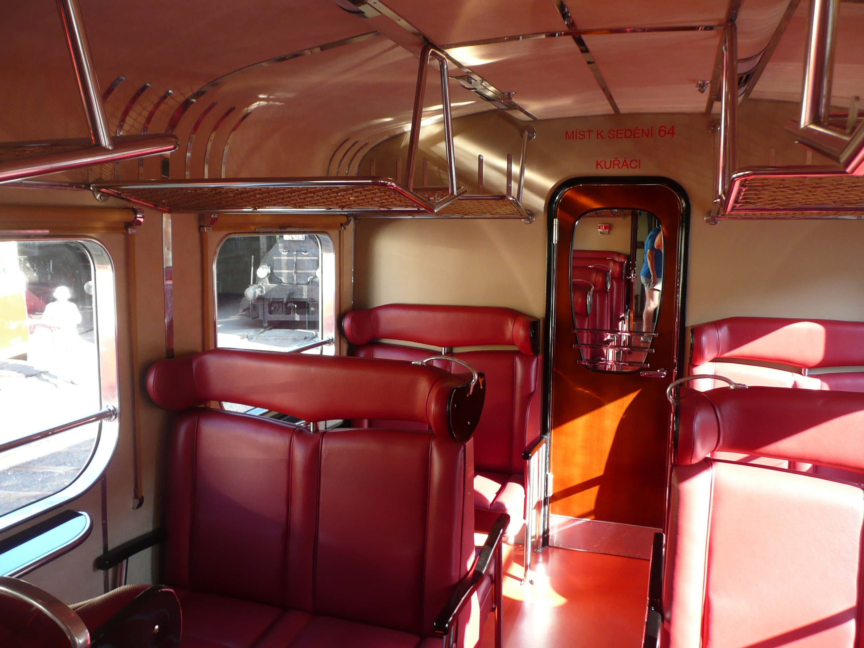 Fahrgastabteil des M 260 001, Raucherabteil